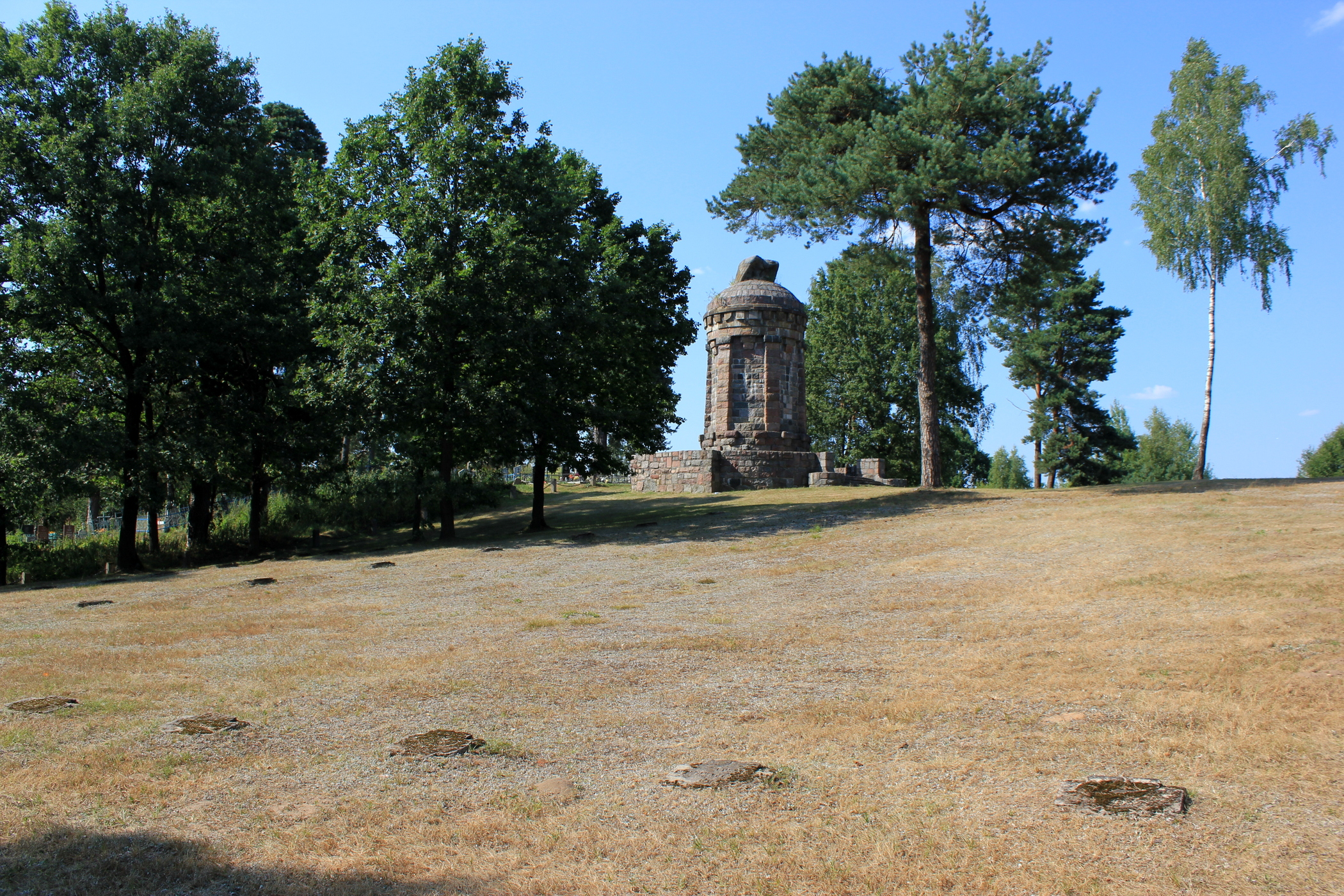 Deutscher Soldatenfriedhof des Ersten Weltkrieges bei Dsjasjatniki, Rajon Waloschyn, Belarus.